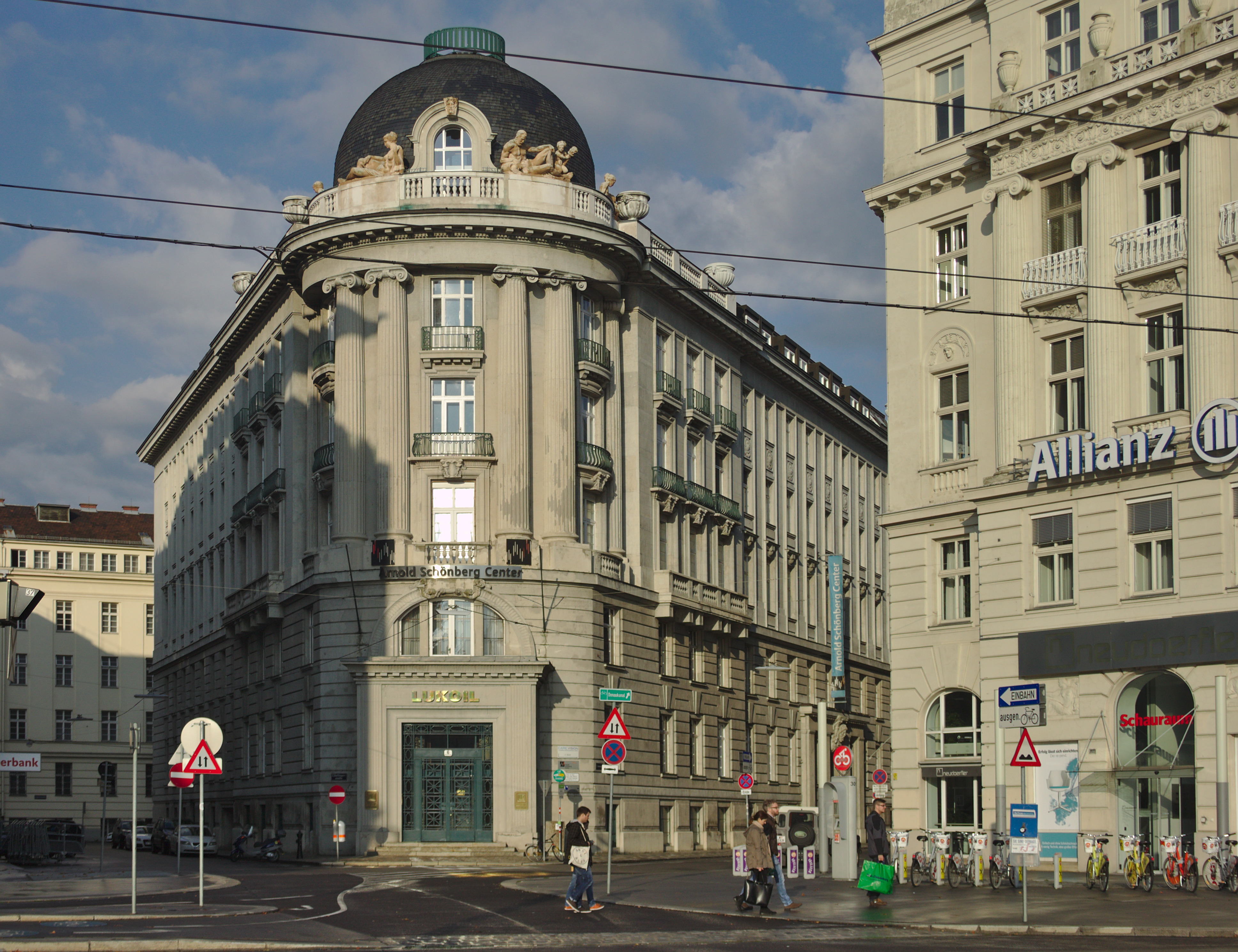 Stadtpalais, Palais Fanto, ehem. Österreichisches Branntweinmonopol